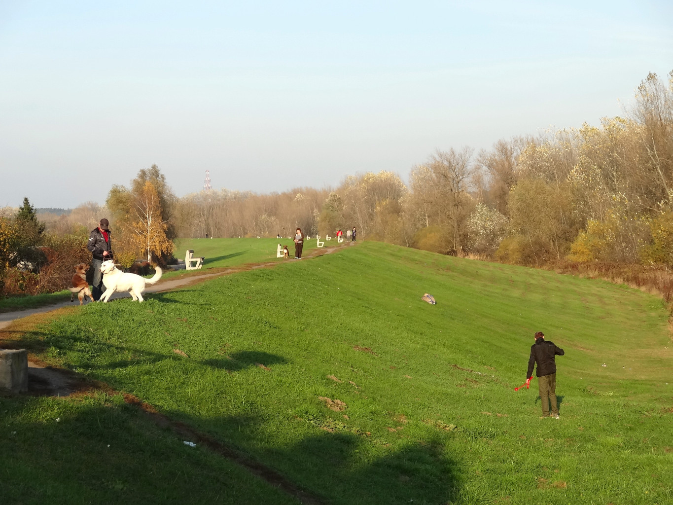 Wał nad Wisłą w Bydgoszczy - Fordonie, na którym znajduje się ścieżka spacerowa oraz nabrzeże Wisły